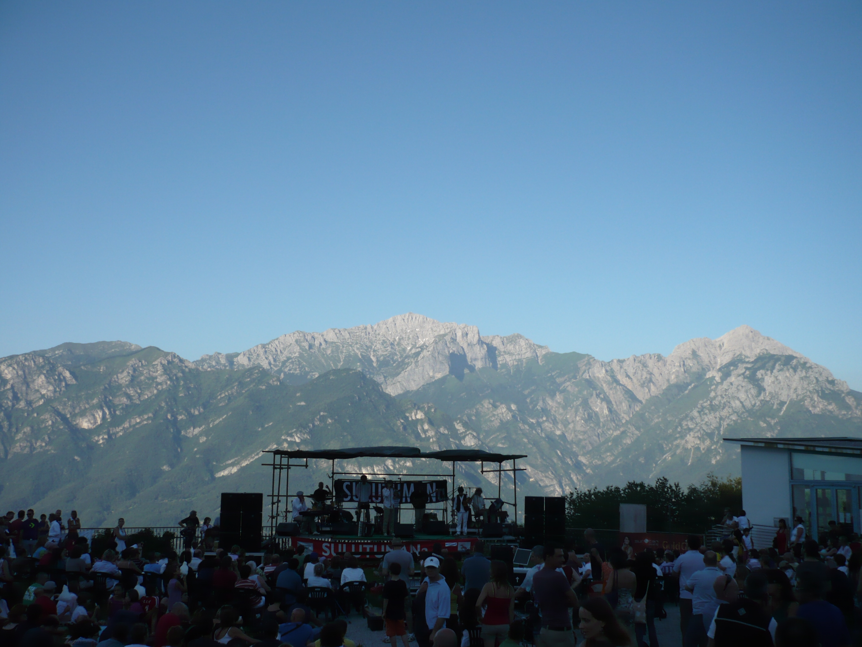 Le Grigne dal Belvedere Romeo (passo del Ghisallo)